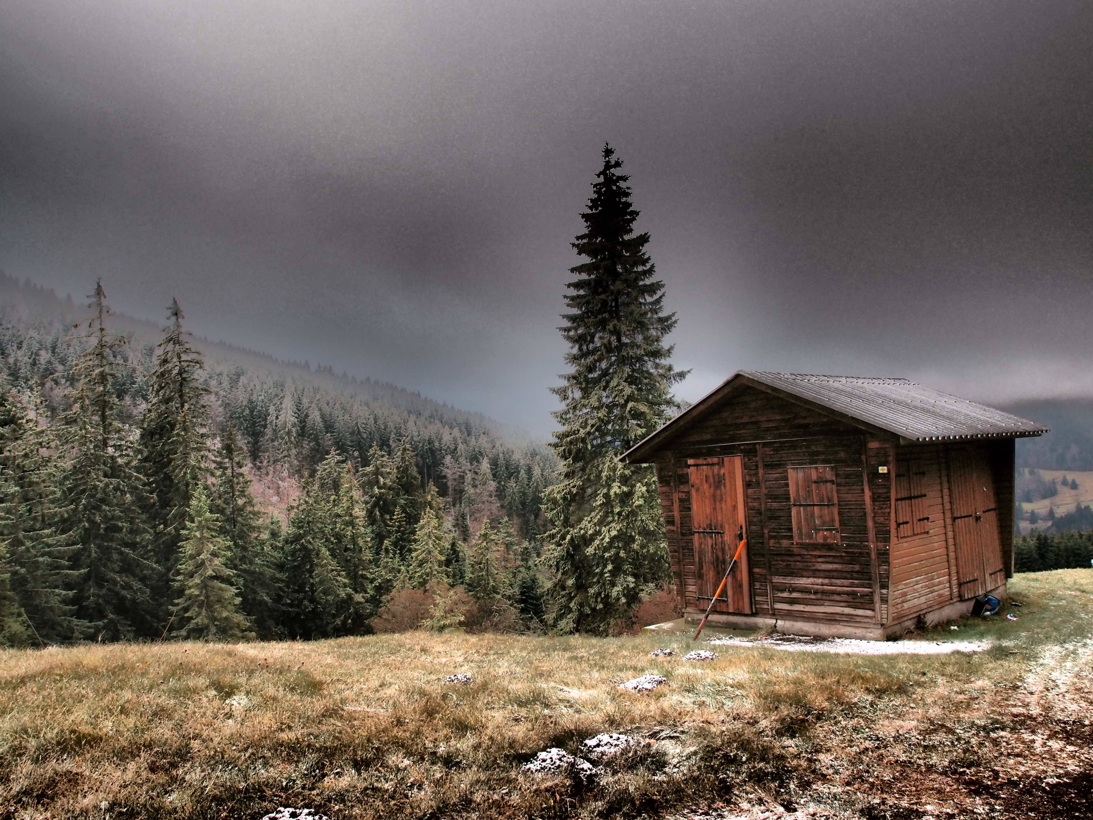 Auf der Passhöhe zwischen Äule und Menzenschwand im Schwarzwald